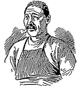 Georg Crum